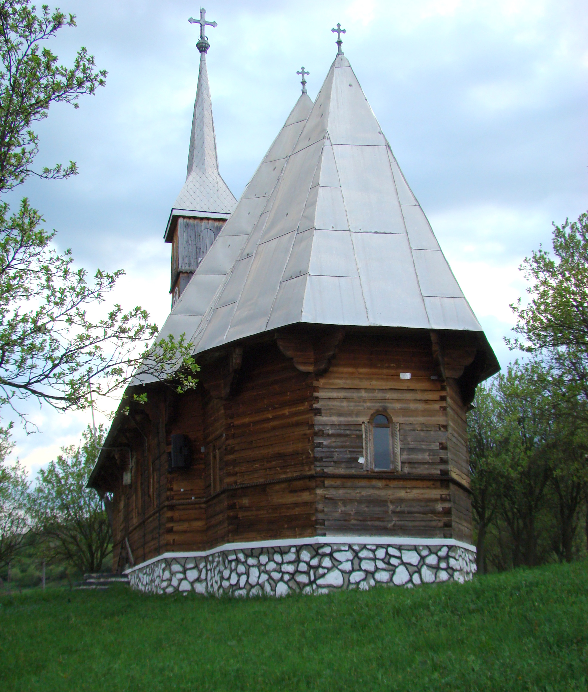 Biserica de lemn Sf.Nicolae Sânbenedic